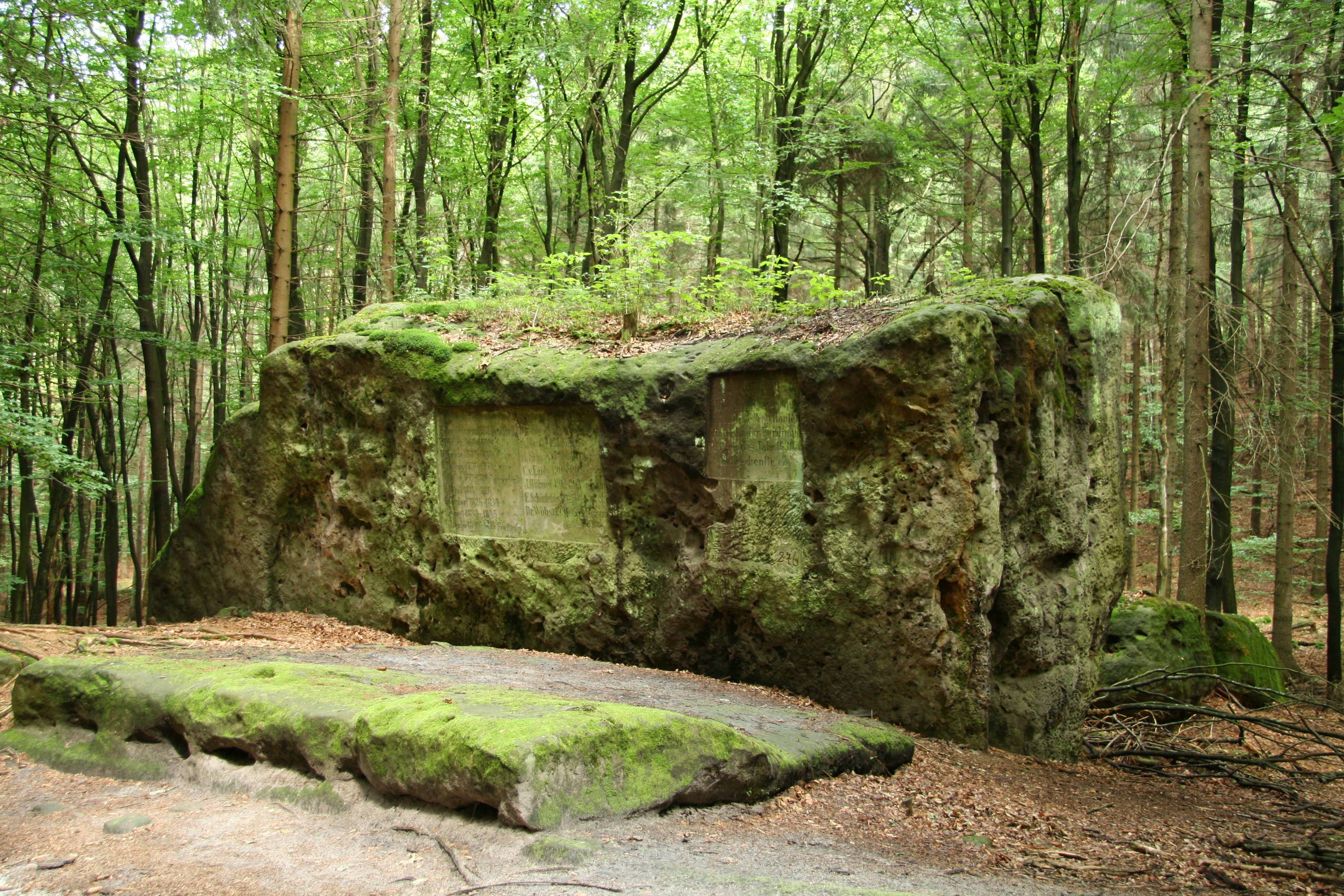 Altarstein im Kirnitzschtal, Elbsandsteingebirge